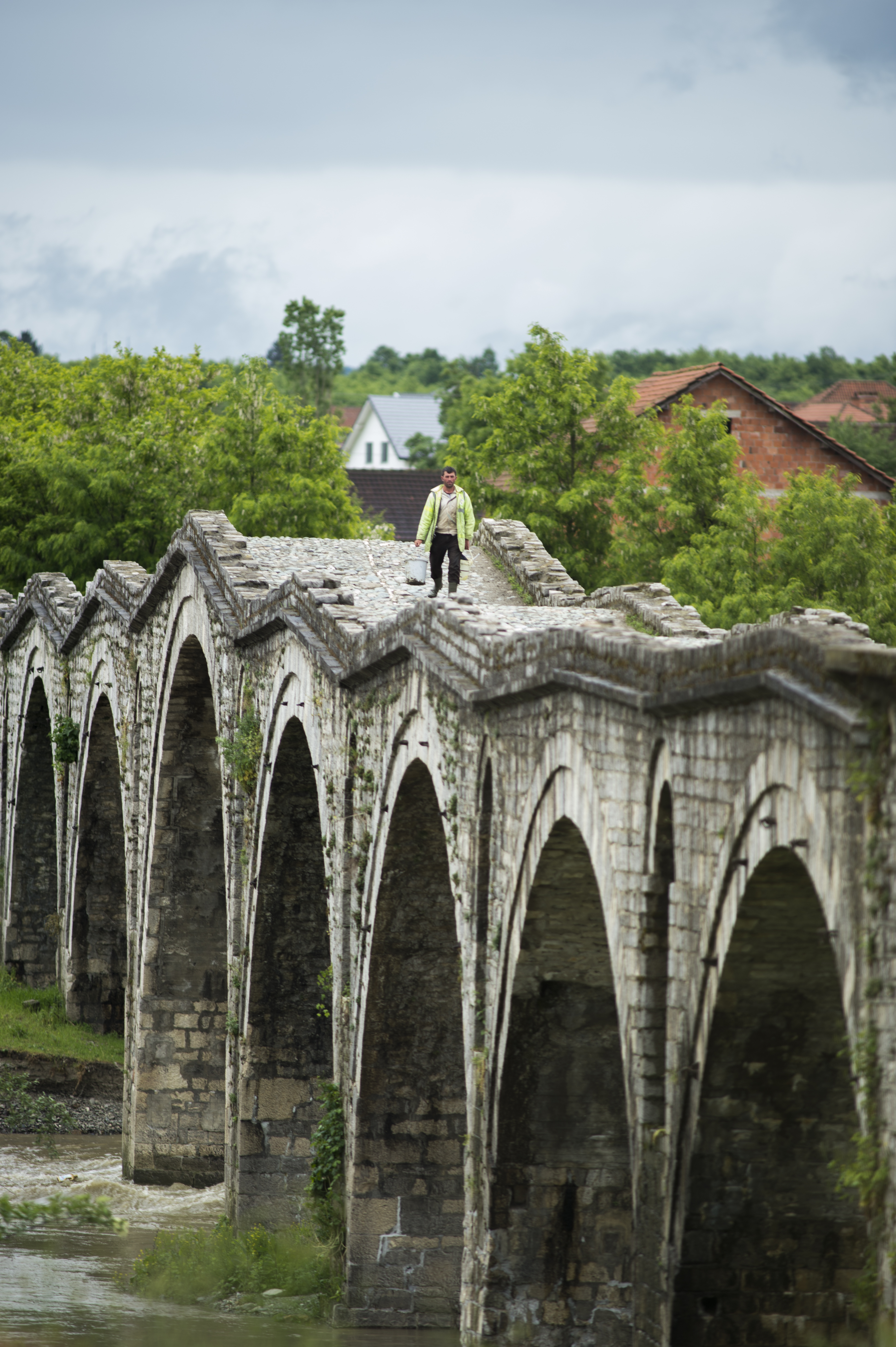 Ura e Terzive